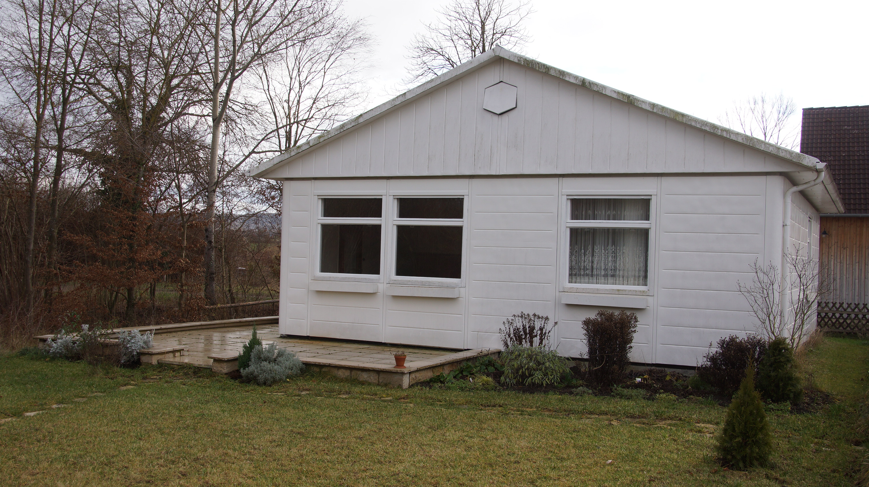 MAN-Stahlhaus im Fränkischen Freilandmuseum Bad Windsheim